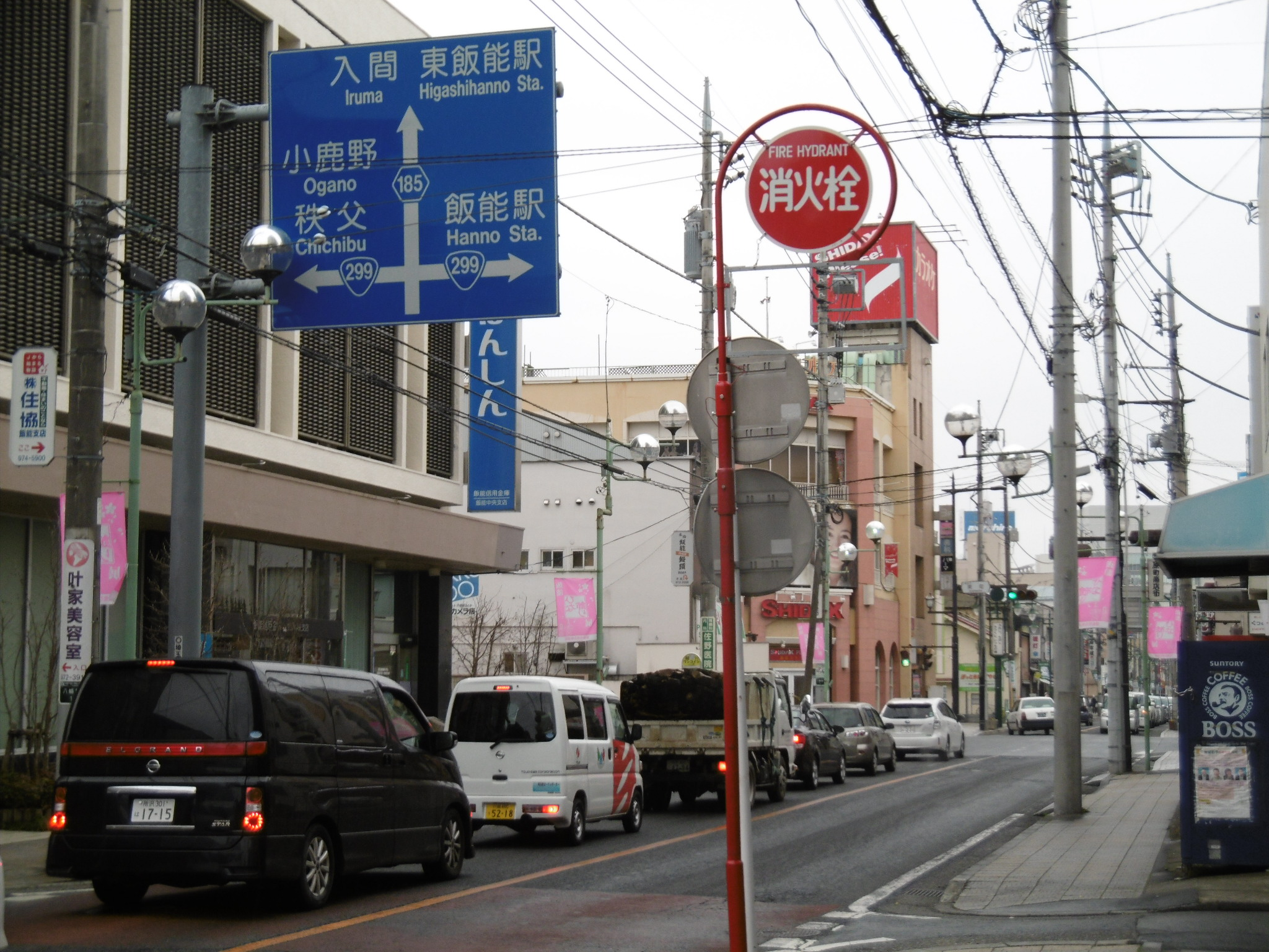 埼玉県飯能市の東町交差点(右奥)で交差する手前方からの埼玉県道70号飯能下名栗線と奥の直進先である埼玉県道185号東飯能停車場線(JRと西武の東飯能駅へ向かう)、さらにその交差点の横を通過する国道299号(右折した先に西武鉄道の飯能駅がある）がそれぞれ通る。